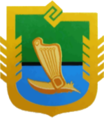 Герб Калевальского района Республики Карелия. Утвержден Решением Совета Калевальского муниципального района 28.07.06. Описание: Герб представляет собой четырехугольный, с закругленными нижними углами, заостренный в оконечности на фоне флага муниципального образования "Калевальский национальный район" шит с изображением стоёщего на нем анфас кантеле золотого цвета на гусином пере золотого цвета. Золотое обрамление щита переходит в стилизованное изображение сосны с обеих сторон. По верхней границе щита расположены стилизованные сцепленные пальцами кисти обеих рук. Автор герба - художник Сергей Кияница